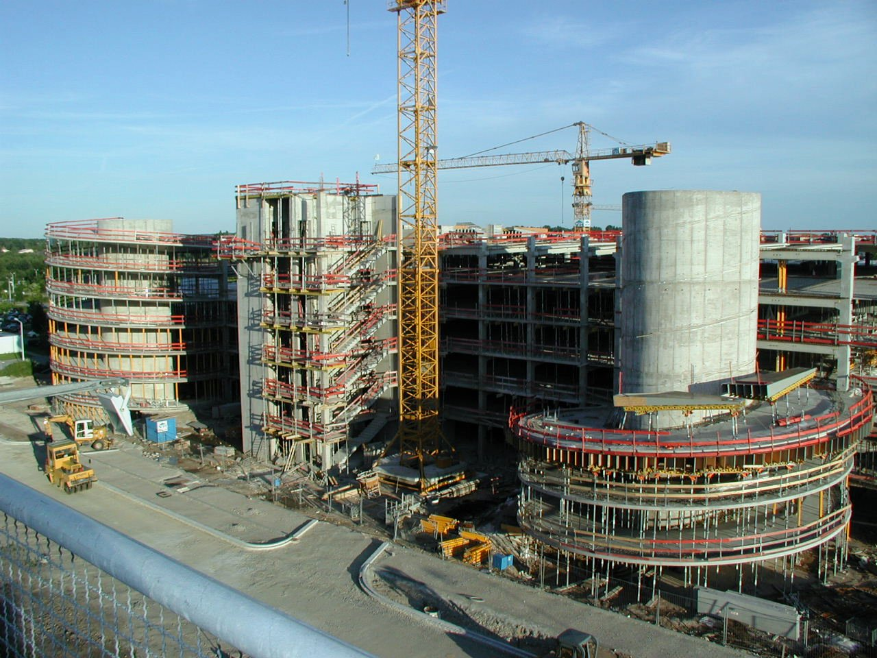 Foto des neuen Parkhauses am Nürnberger Flughafen.